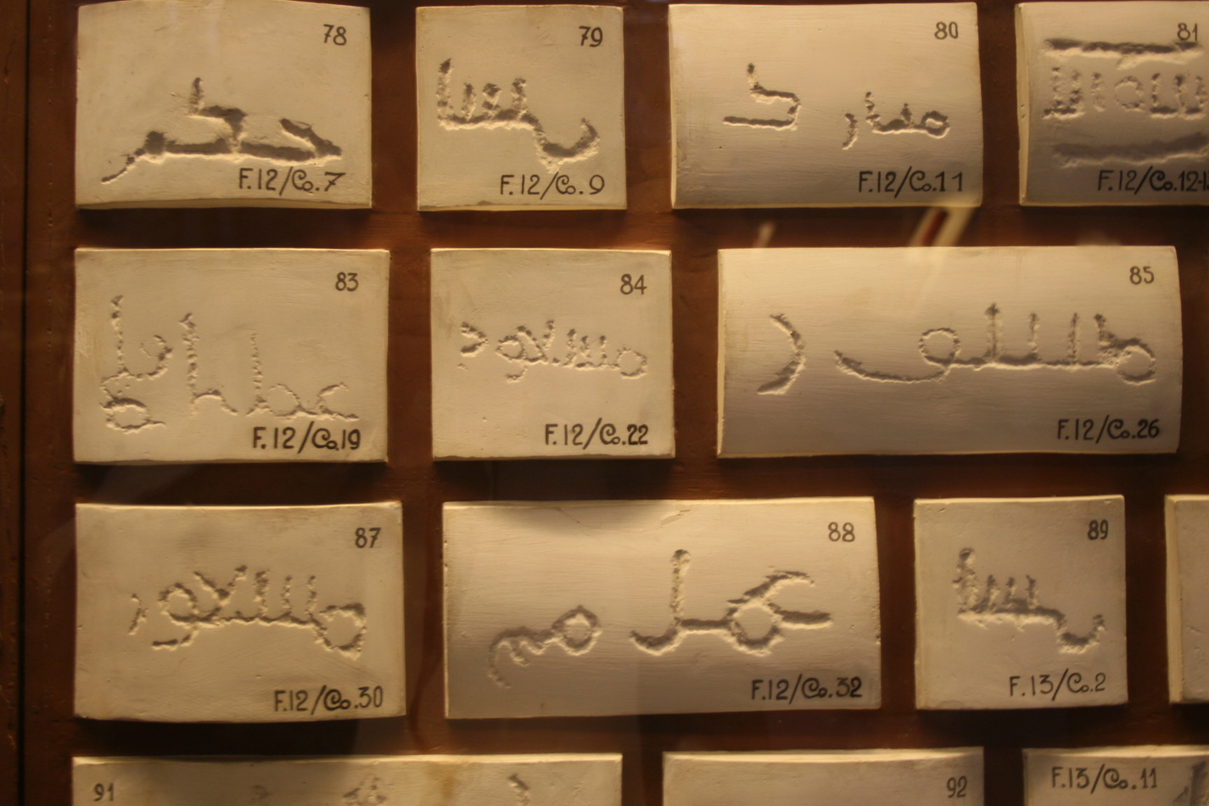 Steinmetzzeichen Mezquita, Cordoba